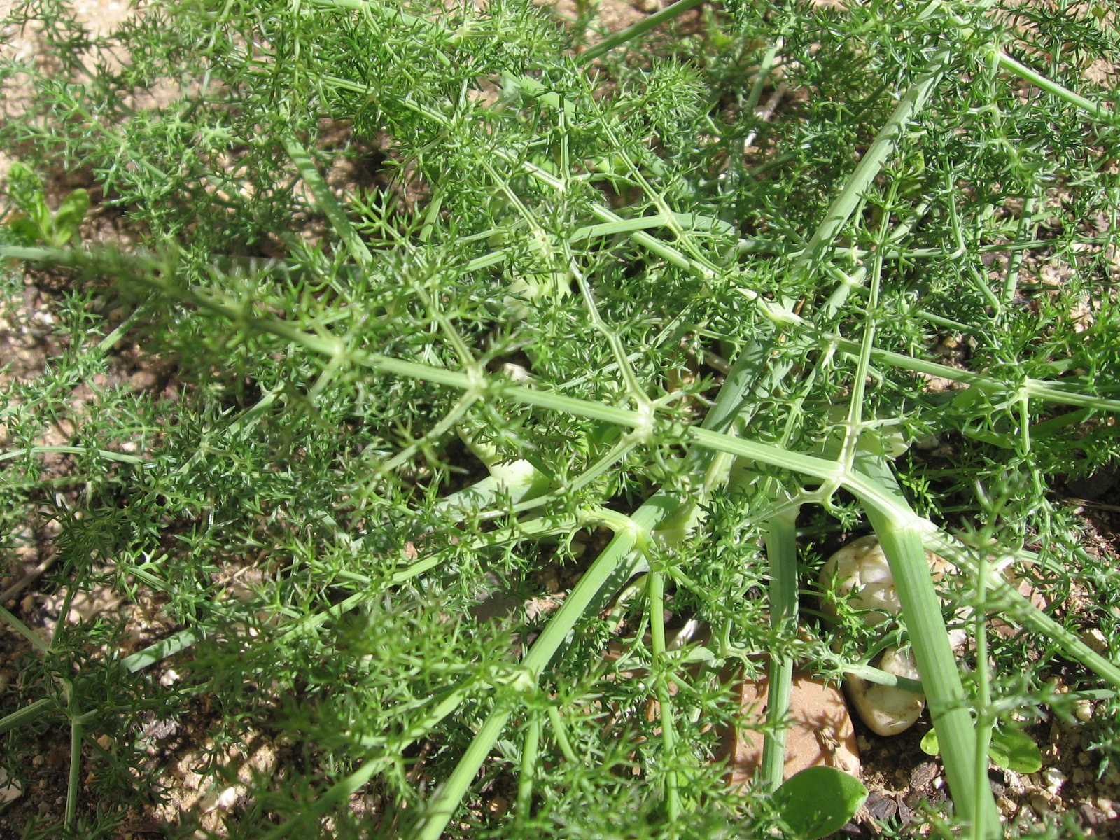 Foeniculum vulgare